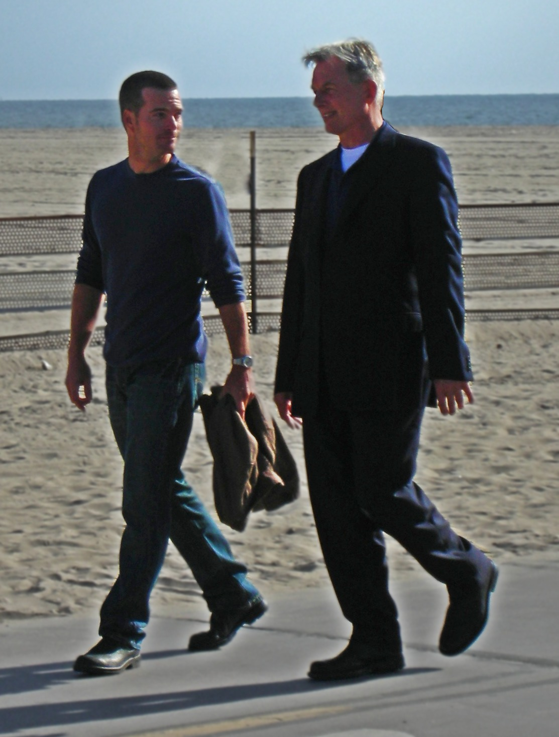 NCIS Filming